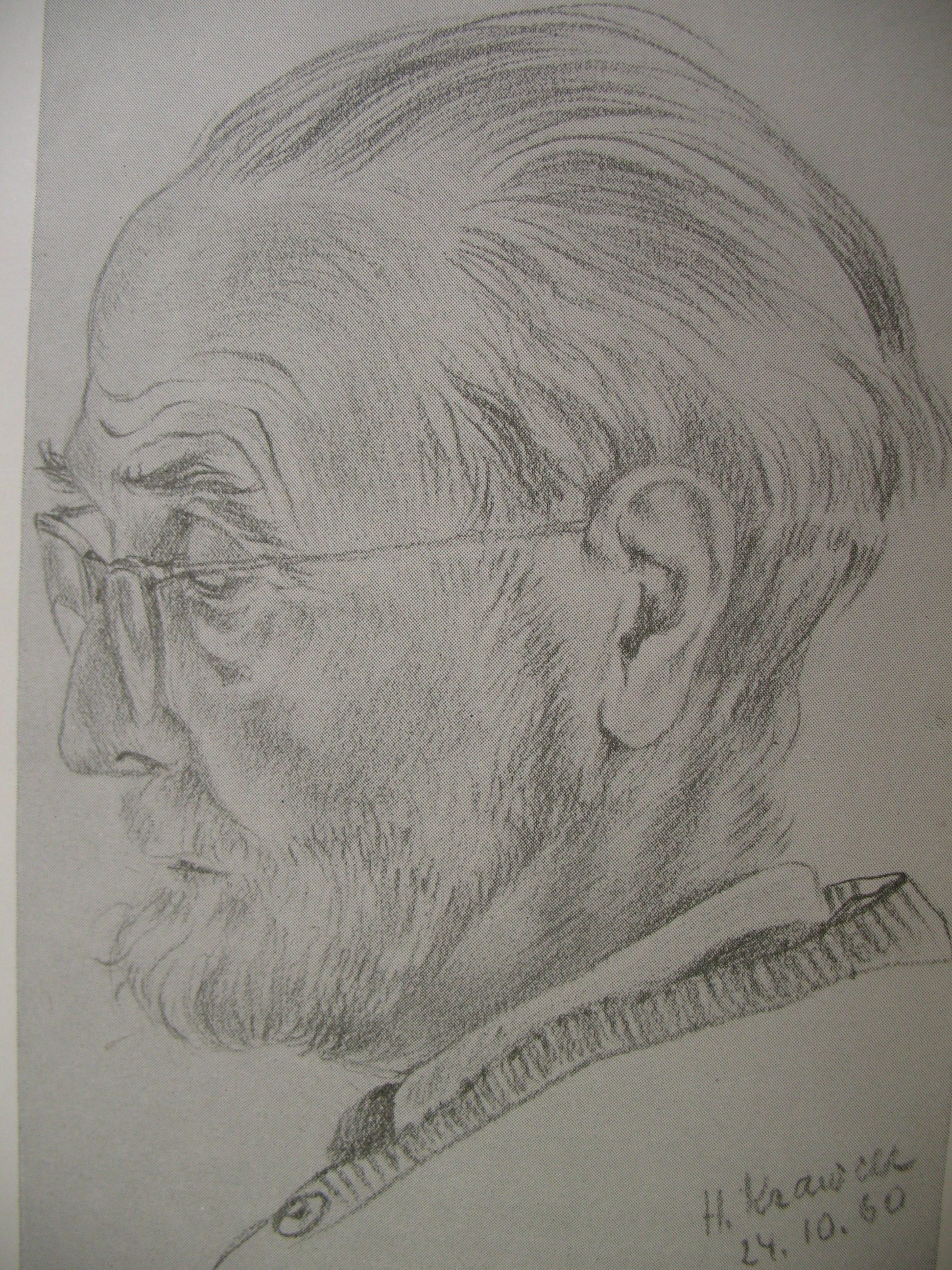 Hornjoserbsce: Michał Nawka rysowany wot H. Krawcec 1960